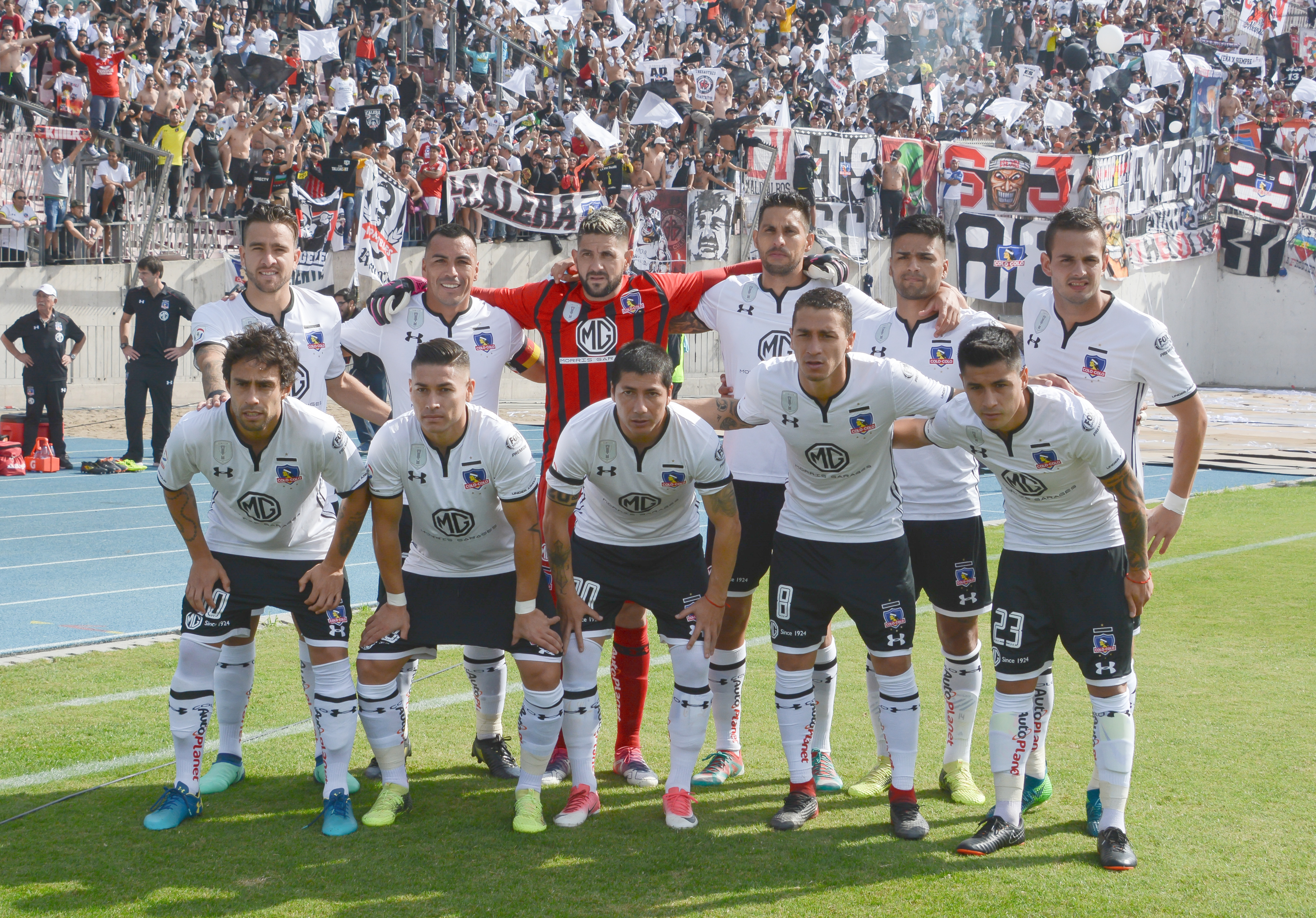 Universidad de Chile v Colo-Colo, Estadio Nacional, Santiago, Chile.